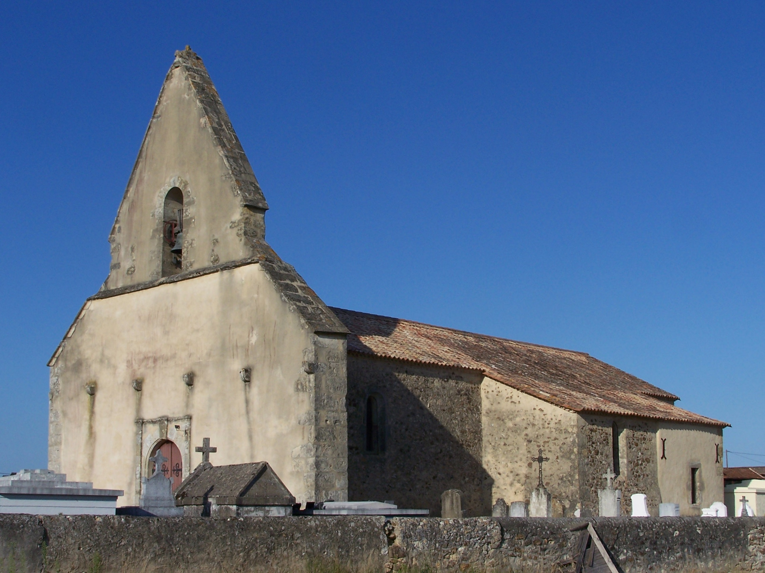 Église de Berthez, Gironde, France